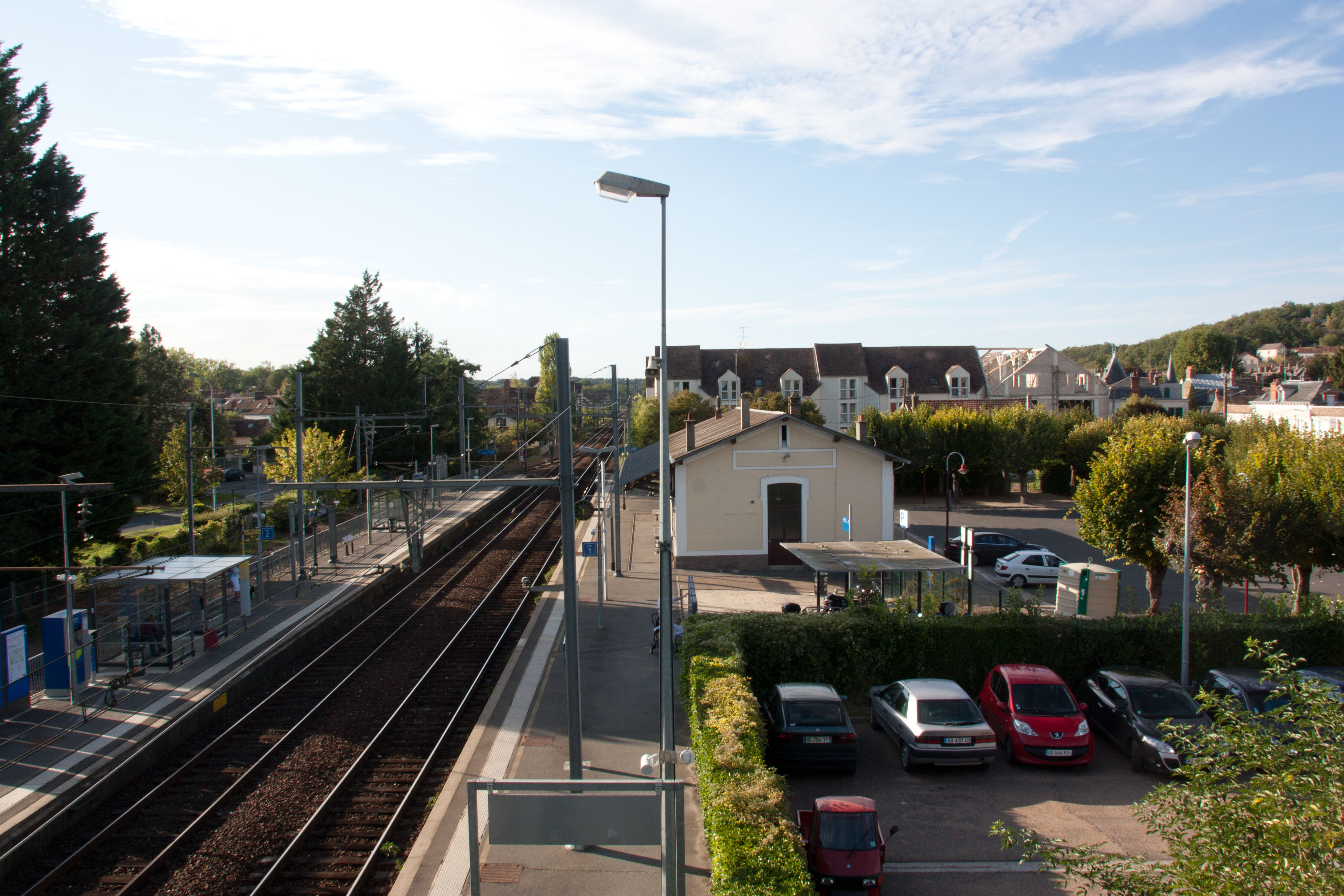 Gare de Souppes - Château-Landon, Souppes-sur-Loing, Seine-et-Marne, France.